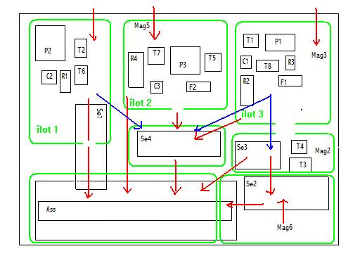 Michel Leff